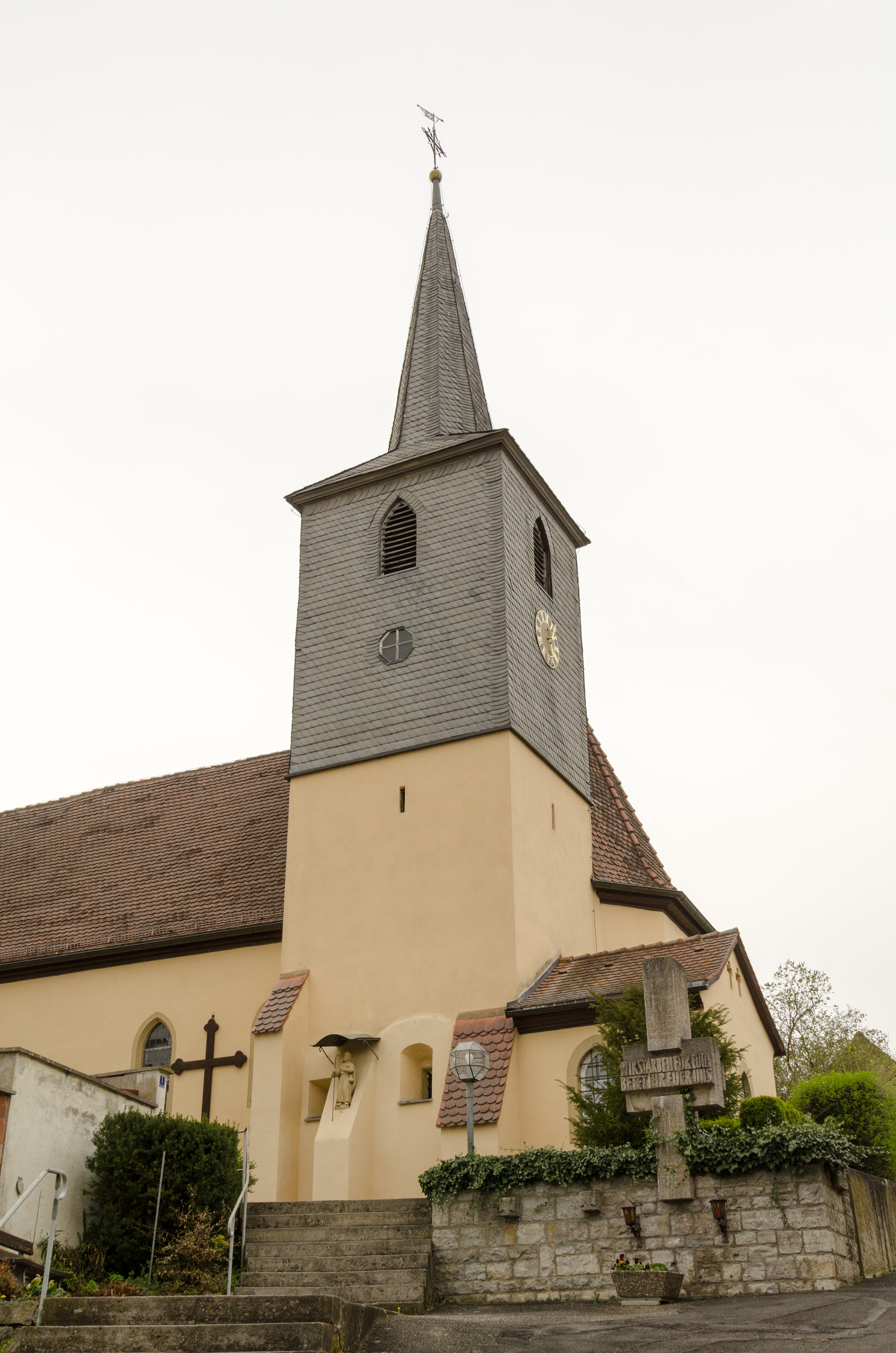 Dettelbach, Brück, Katholische Filialkirche St. Markus und Jakobus